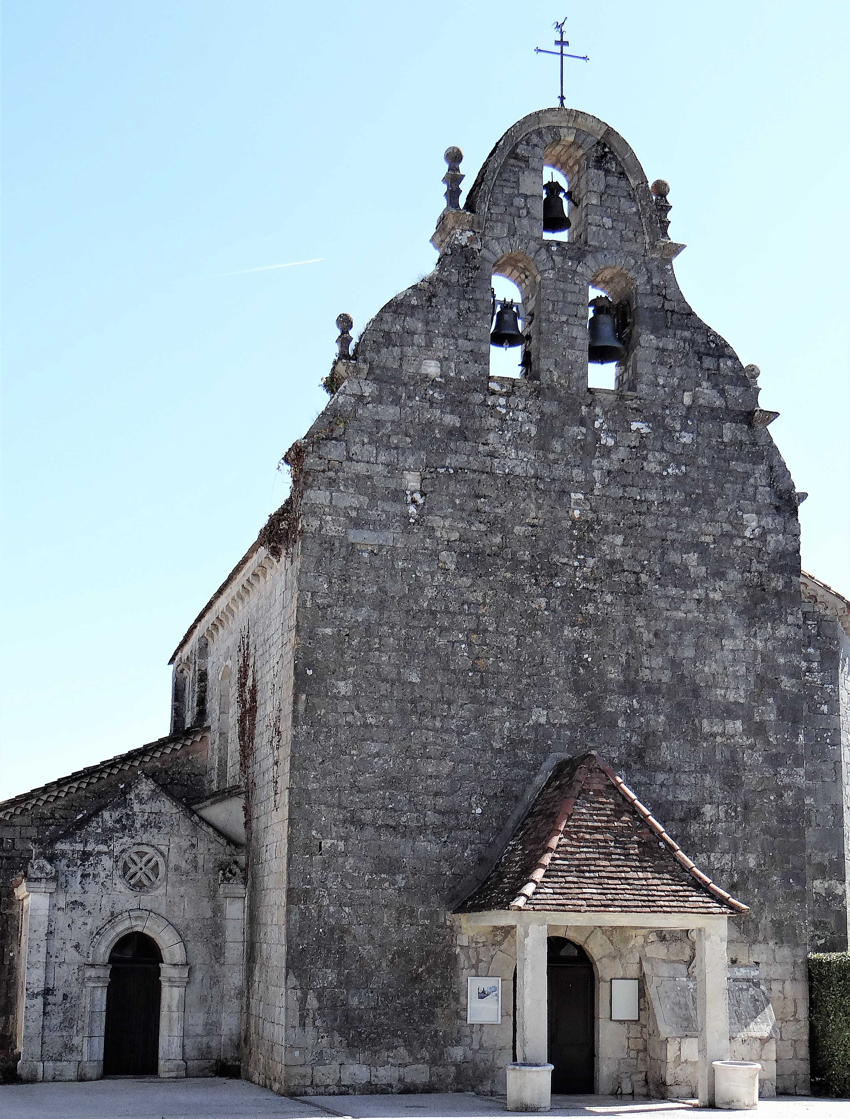 Cambayrac - Église de la Chaire-de-Saint-Pierre : façade occidentale